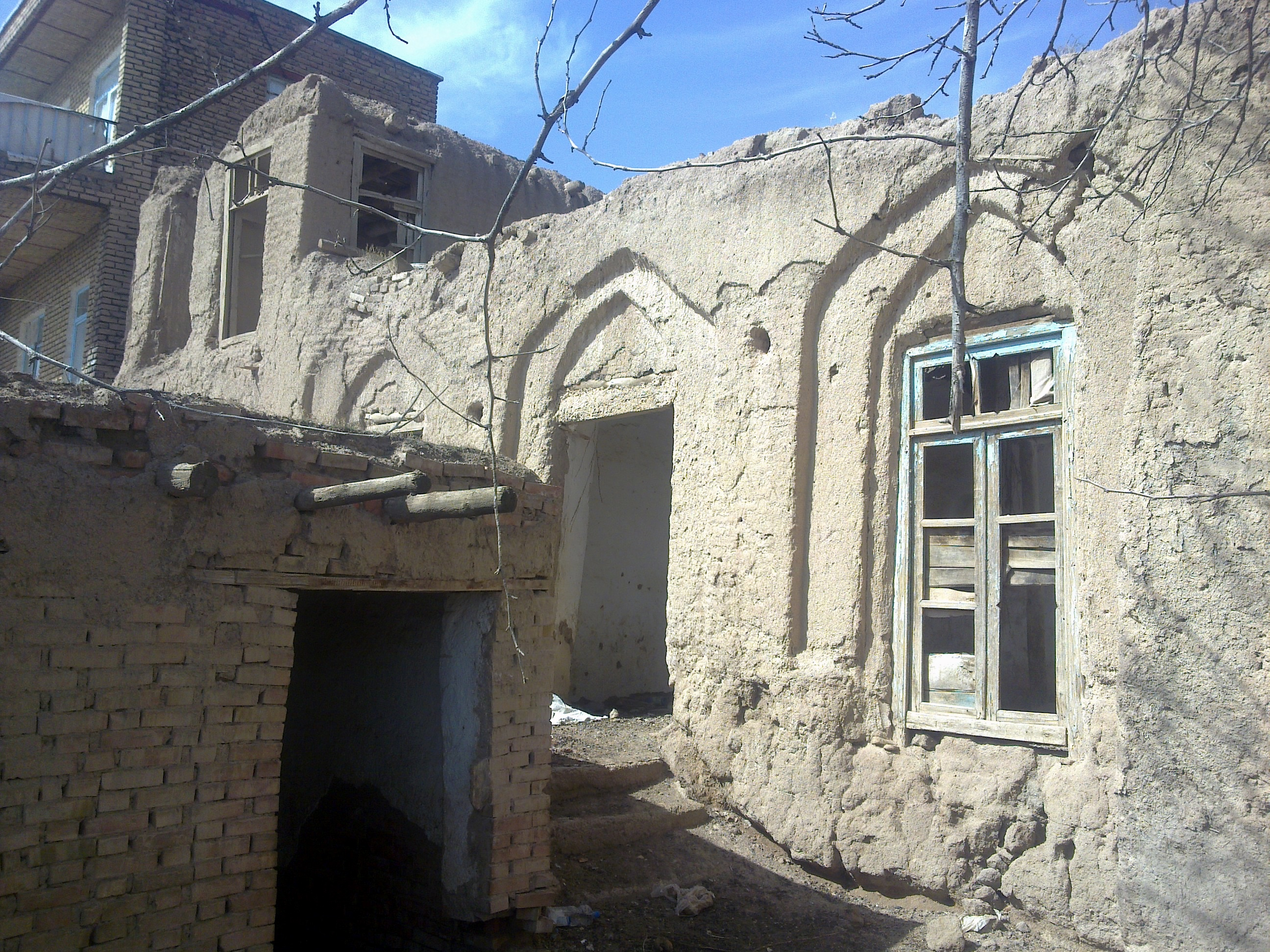 خانه کاظمخان قوشچی در شهر قوشچی